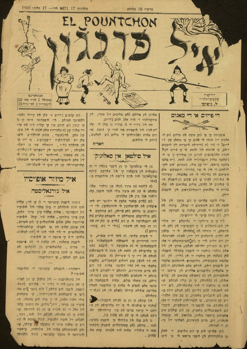 Вестник "Пунчон"